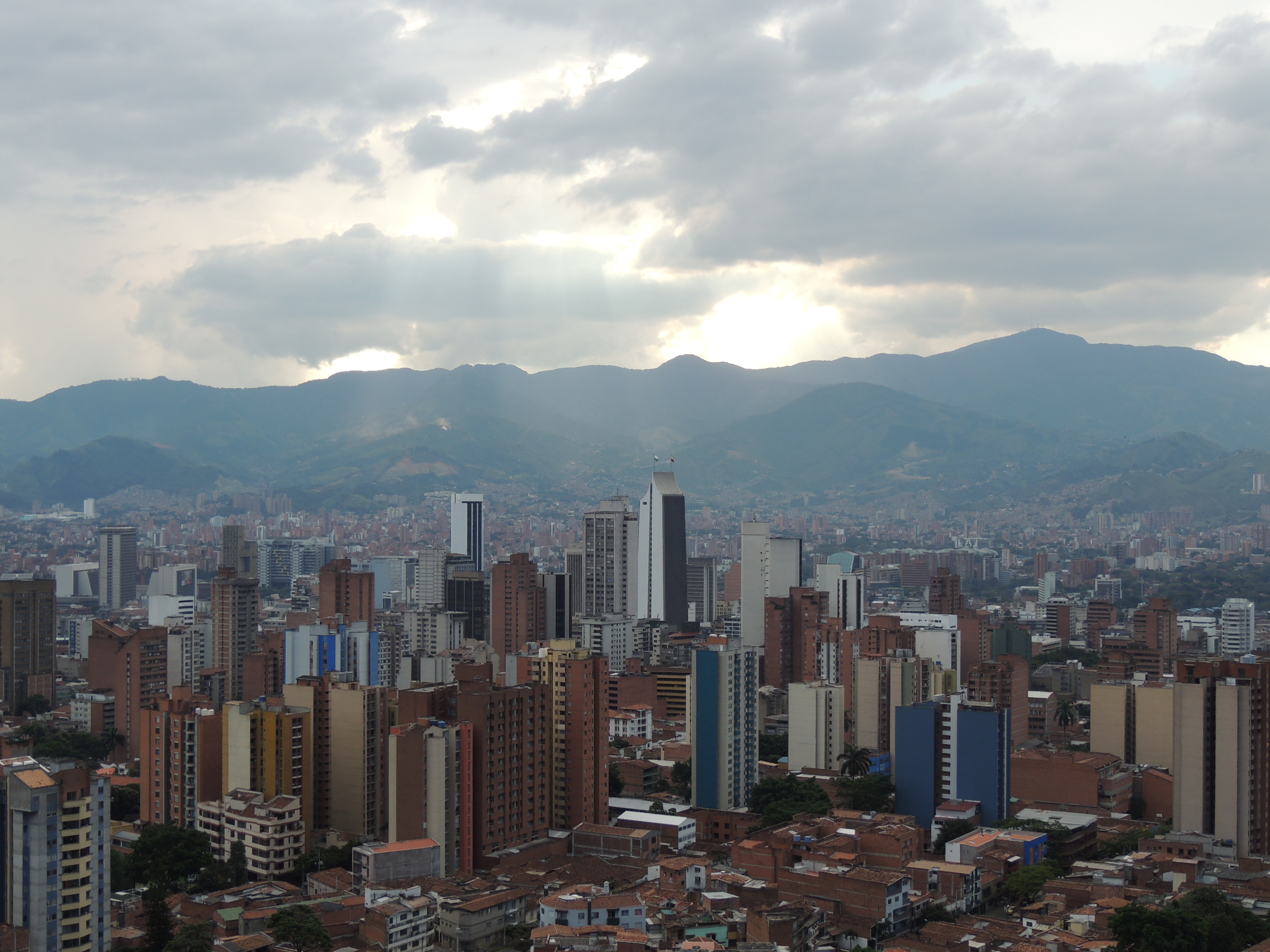 MEDELLÍN - ATARDECER 2014